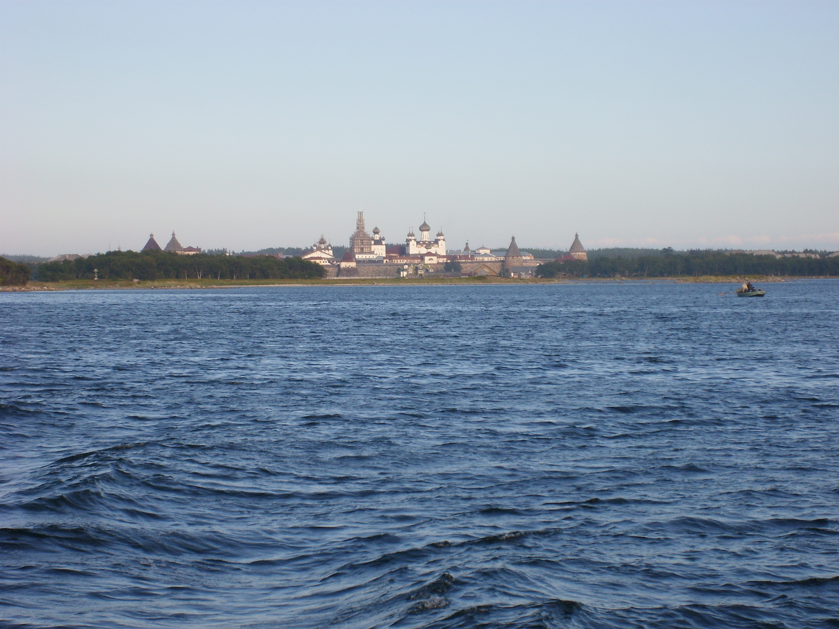 Solovki